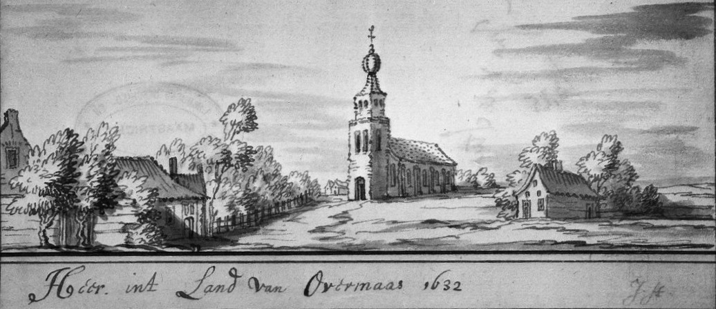 Overzichten: Gezicht op Heer naar prent